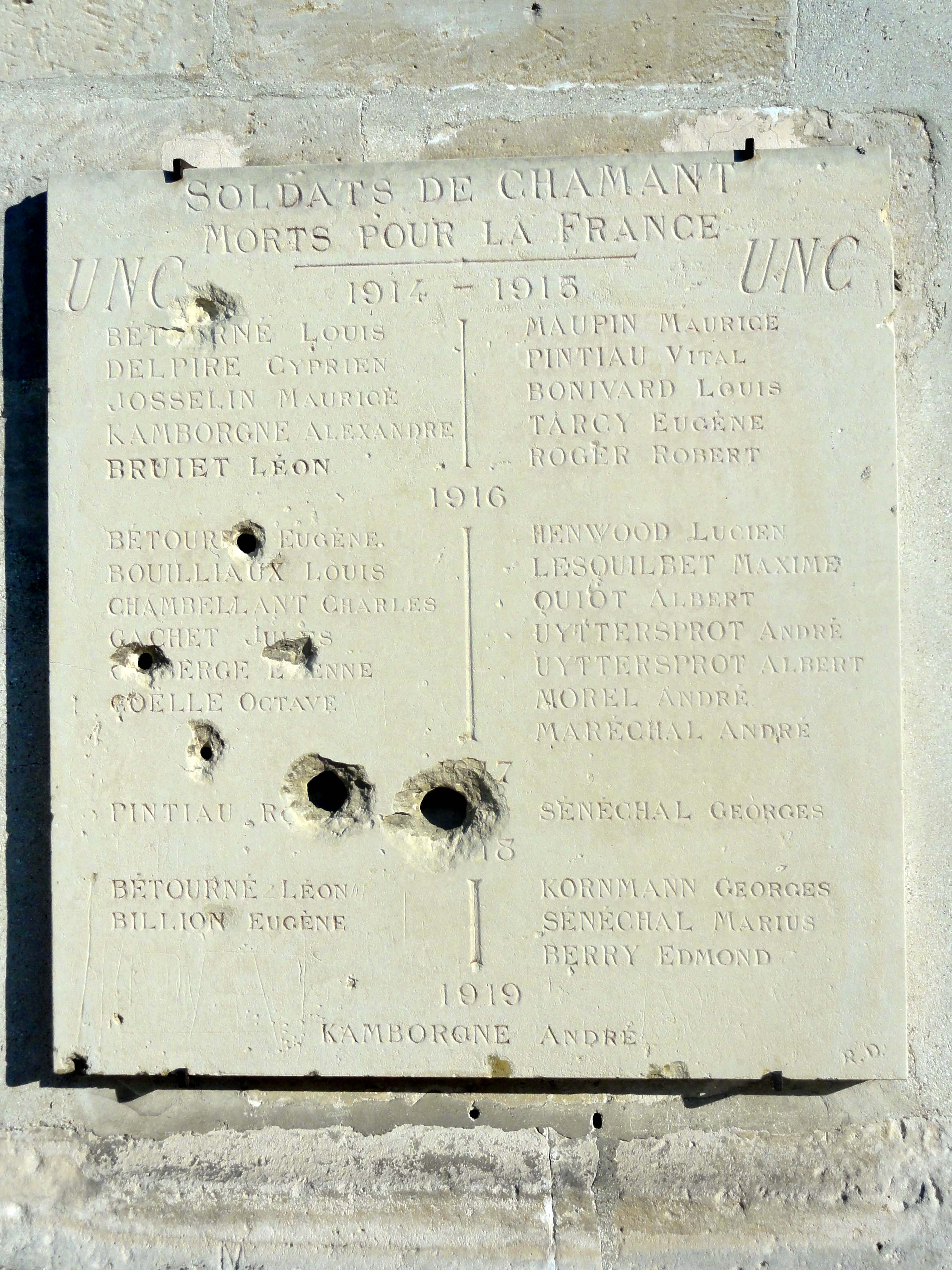 Monument aux morts de la paroisse (à droite du portail).